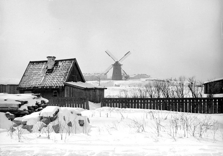 Kvarnen Starckan. Huset i förgrunden i nuvarande kvarteret Domherren vid Westra Humlegårdsgatan